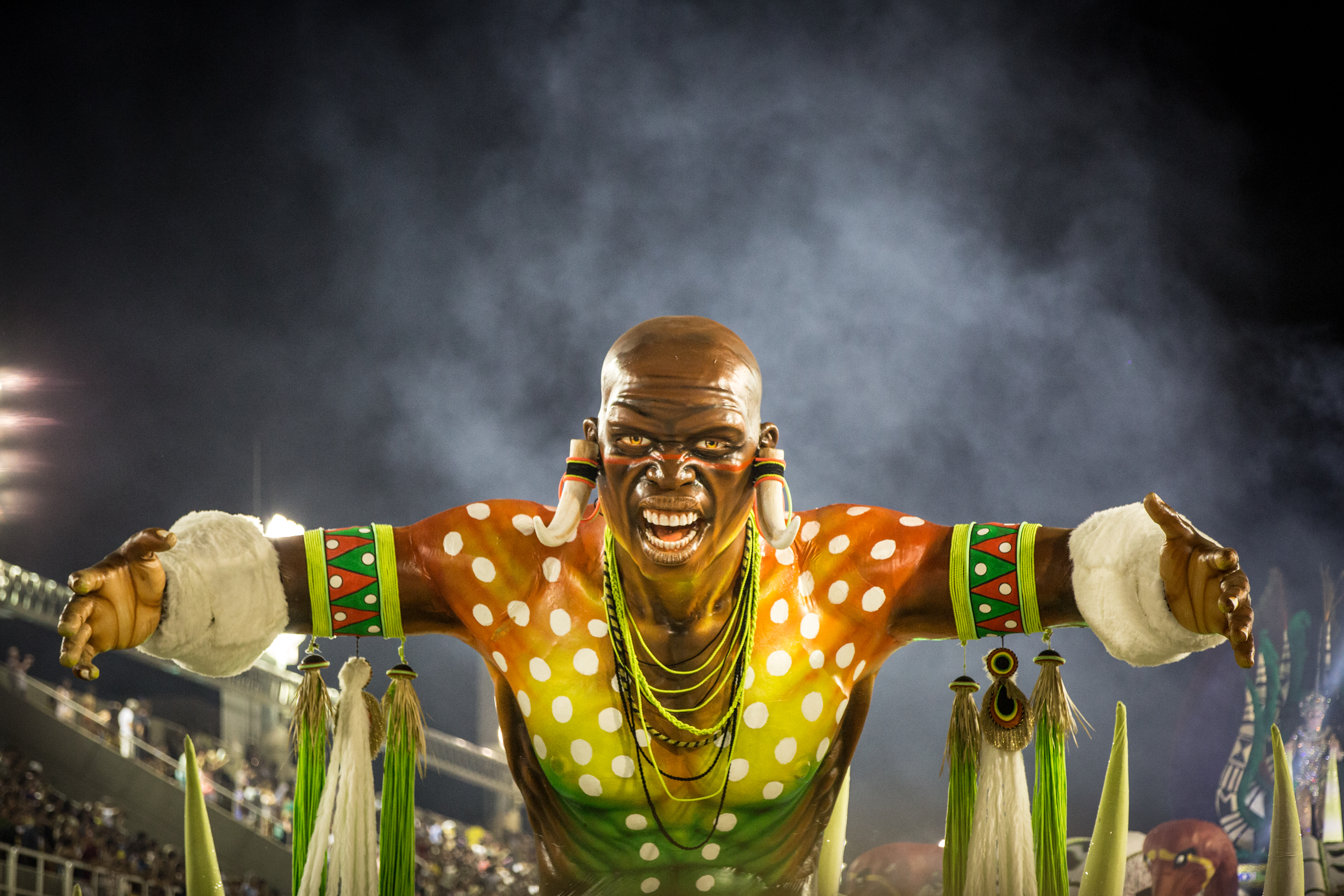 E70A2492.jpg